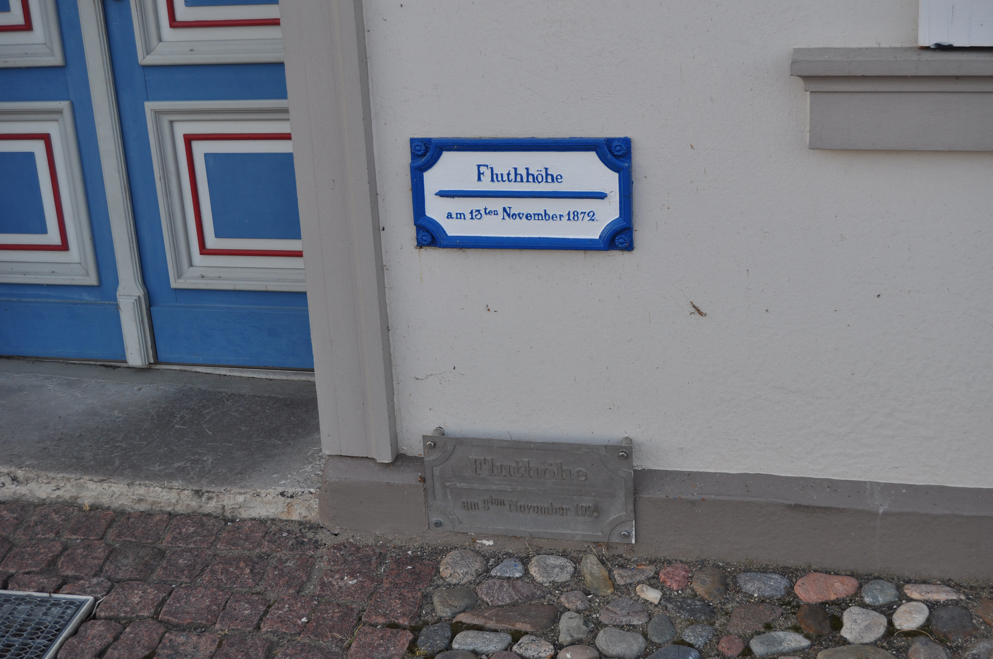 Die Flutmarken in Wiek (Greifswald) 1872 = 2,64 m u. 1995 = 1,94 m